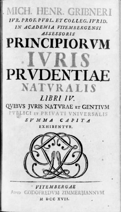 Frontespizio